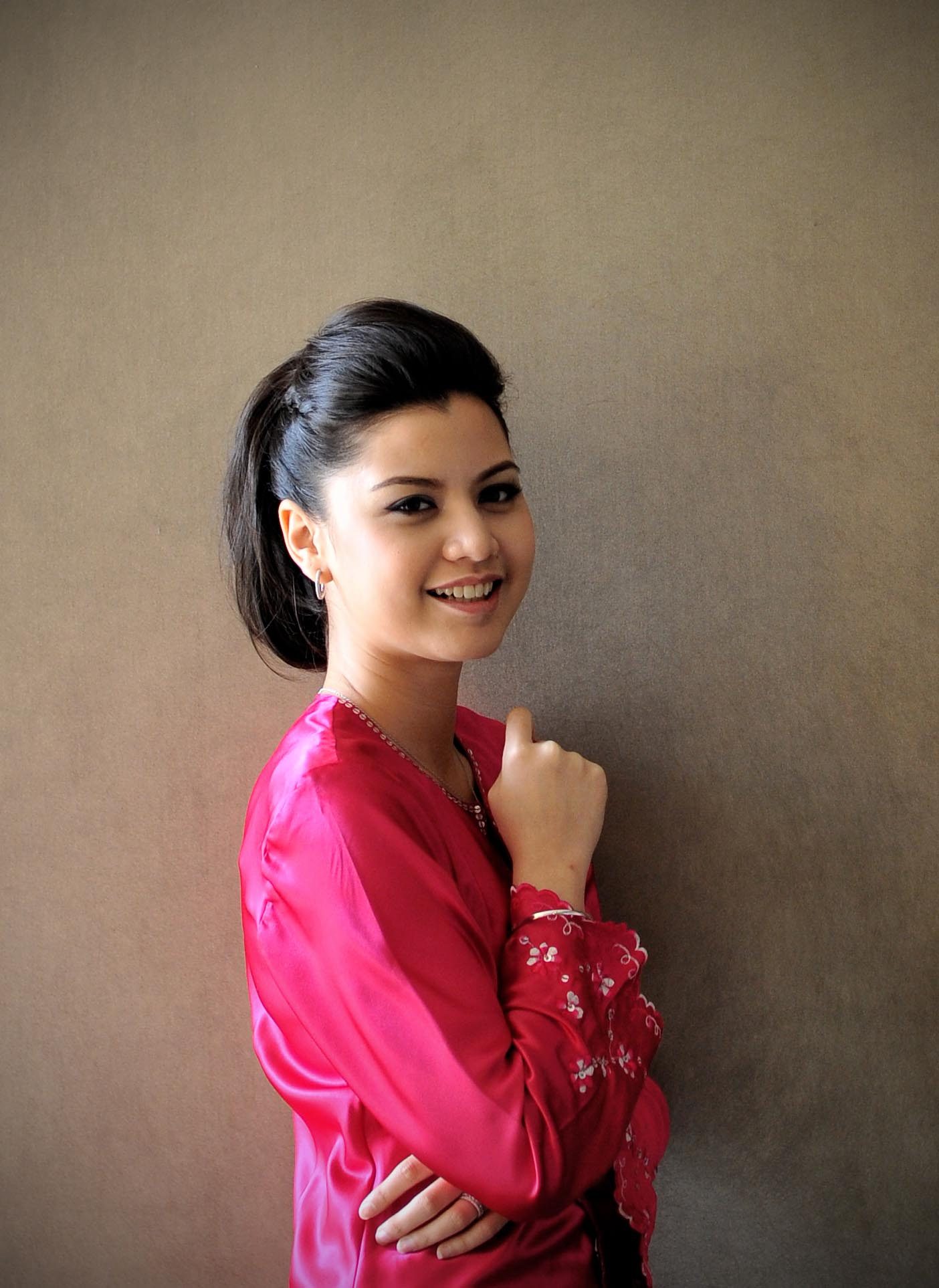 Lisa Surihani